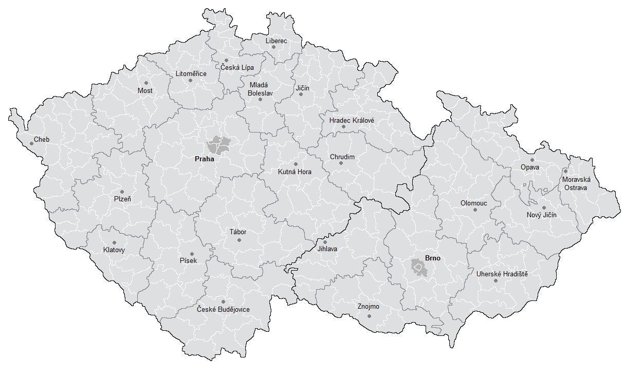 Schematická mapka soudních okresů, krajských a vrchních soudů v zemi České a Moravskoslezské k roku 1930. Tmavěšedě obvody krajských soudů, černě obvody vrchních soudů (Praha a Brno). Tmavě šedou vyznačena také území hlavního města Prahy a zemského hlavního města Brna (na území Prahy celé soudní okresy Vnitřní Praha a Praha-jih a zčásti soudní okresy Praha-sever, Praha-východ a Praha-západ; na území Brna celý soudní okres Brno-město a zčásti soudní okres Brno-okolí). Názvy všech soudních okresů na mapce Politické a soudní okresy 1938.png.